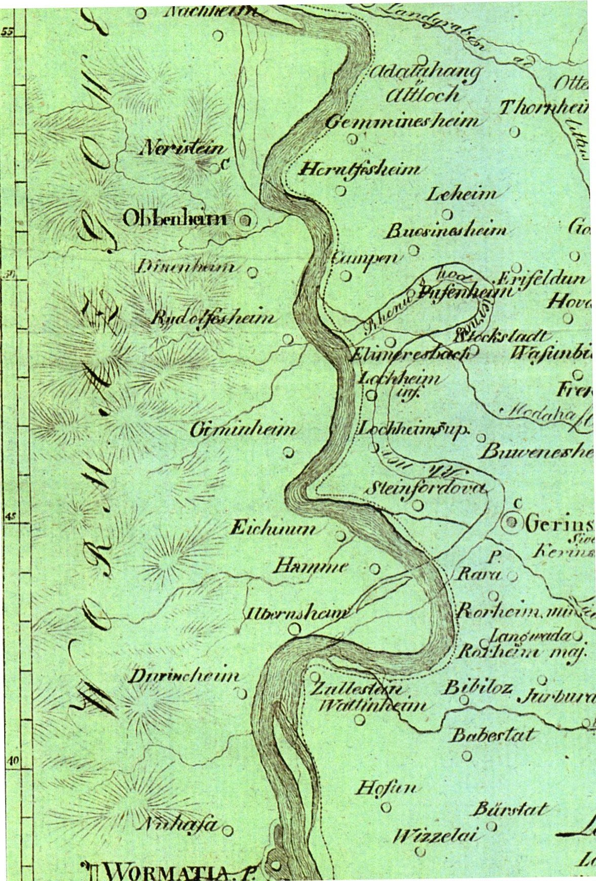 Mittelalterliche Gaue mit altem und neuem Rheinlauf von Andreas Lamey und Ferdinand Denis aus: Pagi Rhenensis ..., Mannheim 1766, Pag. 294